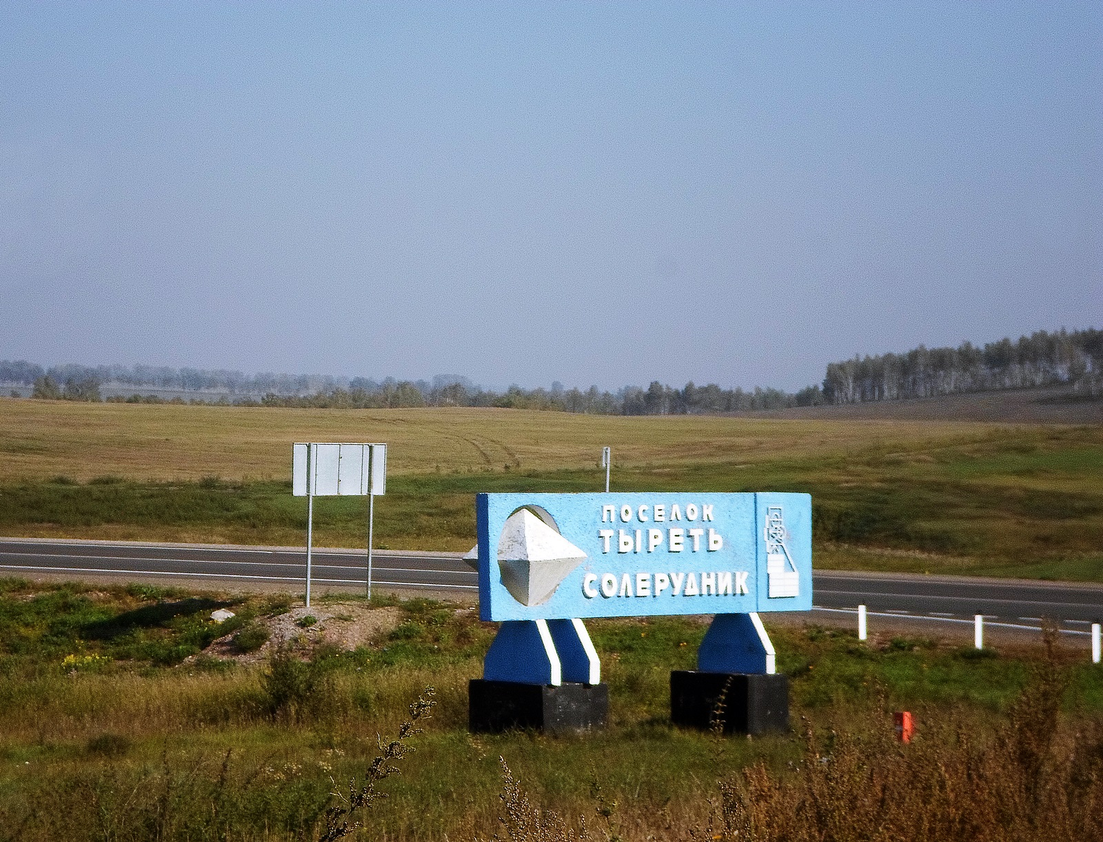 Знак на отвороте с трассы Р255 "Сибирь" (М53) в посёлок Тыреть-1. Заларинский район Иркутской области.